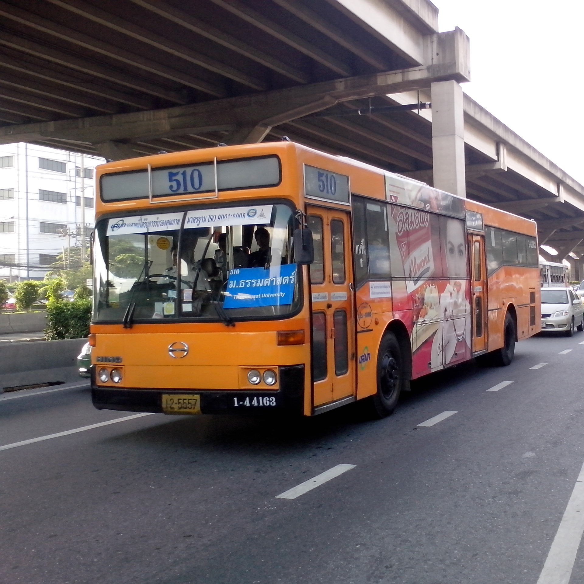 bus no.1-44163